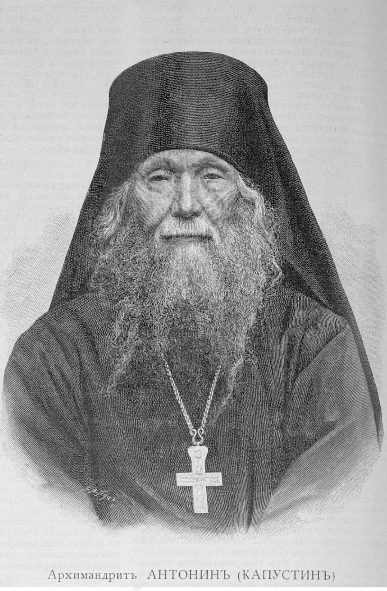 Антонин (Капустин), архимандрит